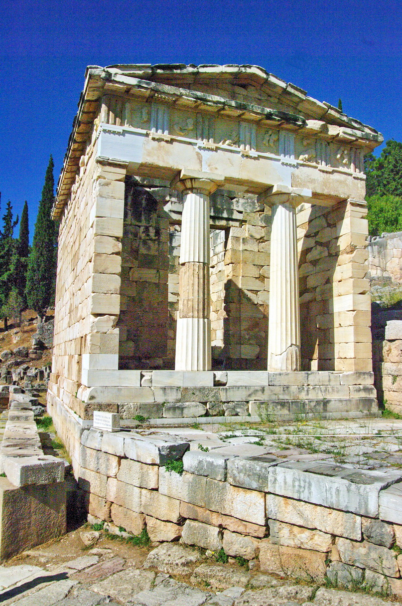 Delphi, Schatzhaus von Athen